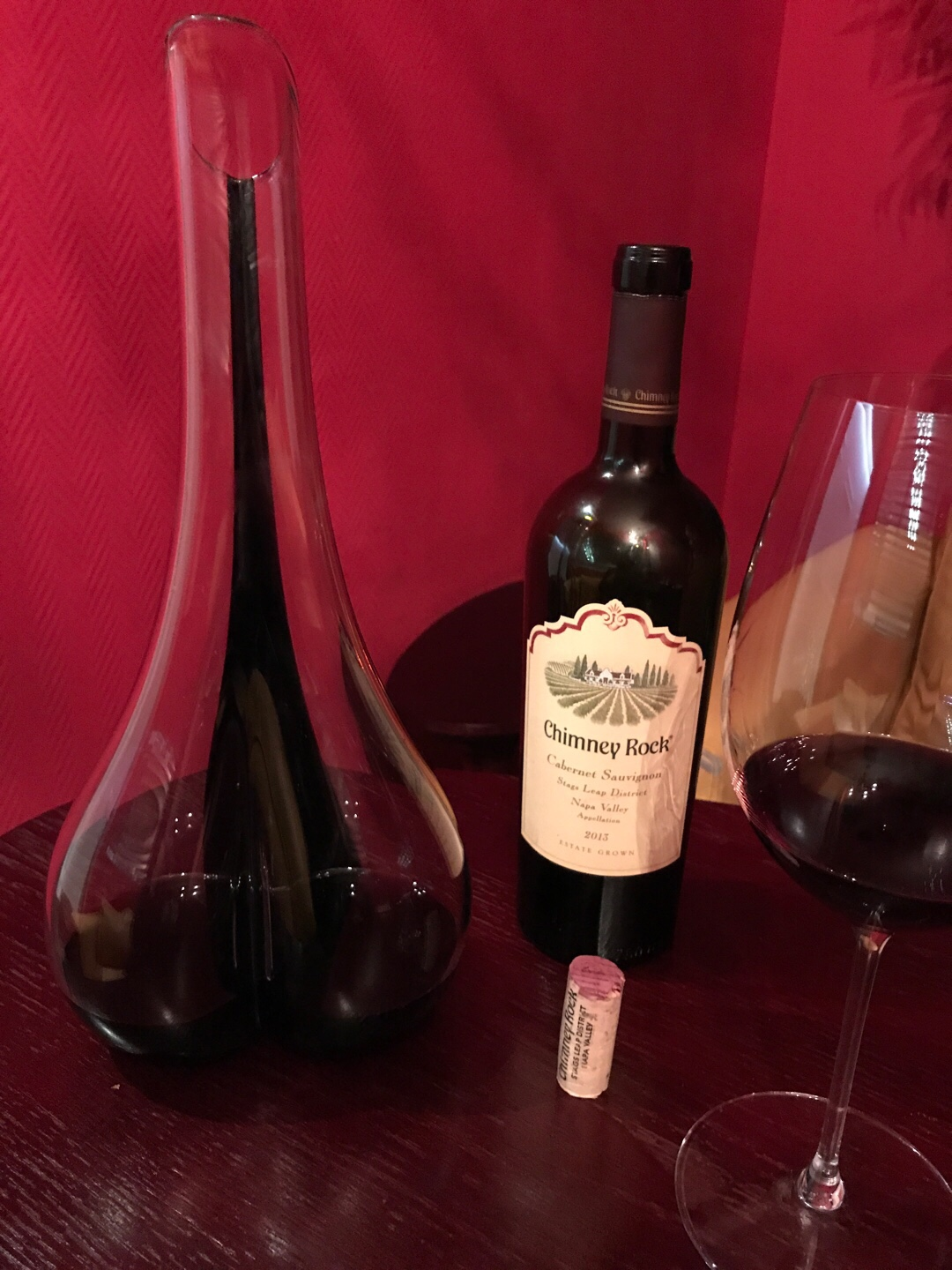 와인의 천연 코르크